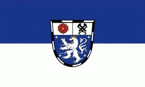 Flagge Stadt Saarbrücken This file depicts the flag of a German Körperschaft des öffentlichen Rechts (corporation governed by public law). According to § 5 Abs. 1 of the German Copyright law, official works like flags are gemeinfrei (in the public domain). Note: The usage of flags is governed by legal restrictions, independent of the copyright status of the depiction shown here.